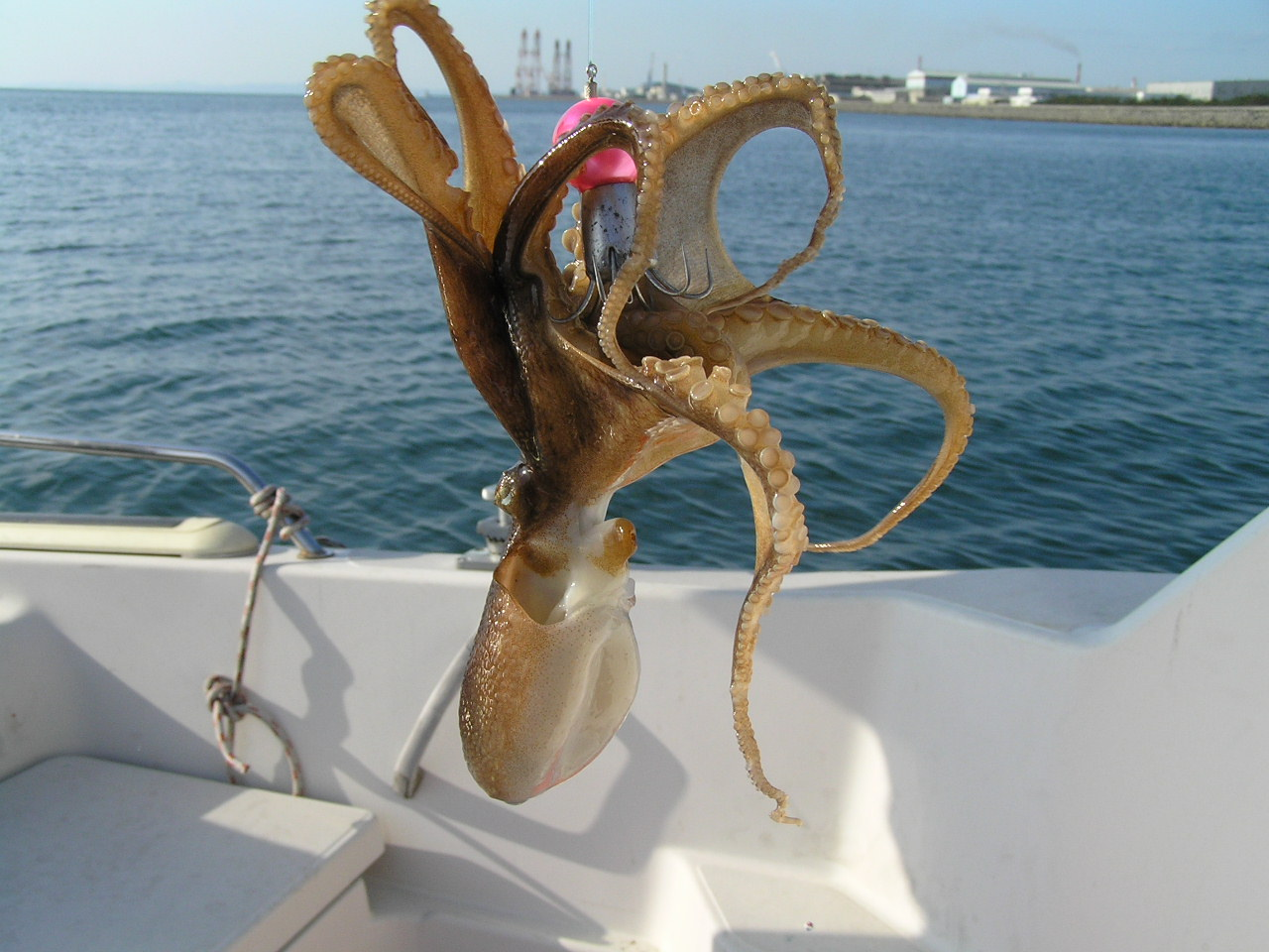 Amphioctopus fangsiao (d'Orbigny, 1839) (イイダコとイイダコテンヤ（明石市二見沖）